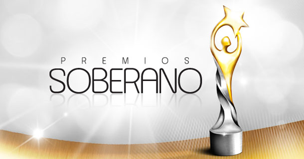 Estatutilla de Premios Soberano.